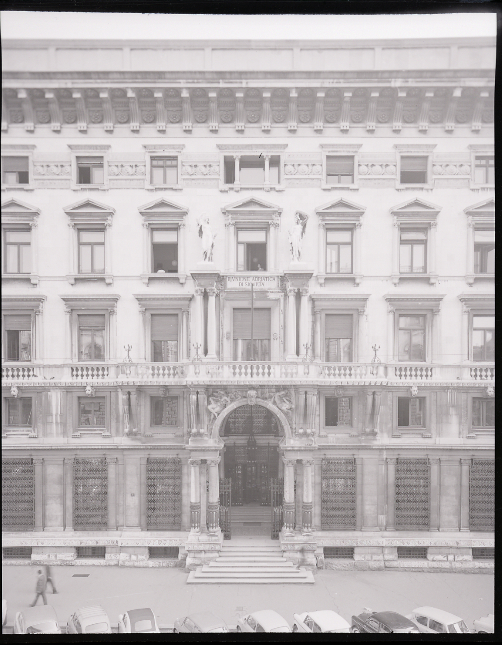 Servizio fotografico : Trieste, 1964 / Paolo Monti. - Buste: 51, Fototipi: 52 : Negativo b/n, gelatina bromuro d'argento/ pellicola ; 10x12. - ((Serie costituita da 51 buste sciolte di negativi identificati con i nn.: 8045, 8046, 8047, 8048, 8049, 8050, 8051, 8052, 8053, 8054, 8054bis, 8055, 8056, 8057, 8058, 8059, 8060, 8061, 8062, 8063, 8064, 8065, 8066, 8066bis, 8067, 8068, 8069, 8070, 8071, 8072, 8073, 8073bis, 8074, 8075, 8076, 8077, 8078, 8078bis, 8079, 8080, 8081, 8082, 8083, 8084, 8085, 8086, 8087, 8088, 8089, 8090, 8091. - Le buste sono numerate da 1 a 47. - Fonte: Agenda di Paolo Monti: R 1 - Monti/ 1 aprile 1963 - 6 giugno 1964/ 6000-8193 (1963-1964), presso Archivio Paolo Monti